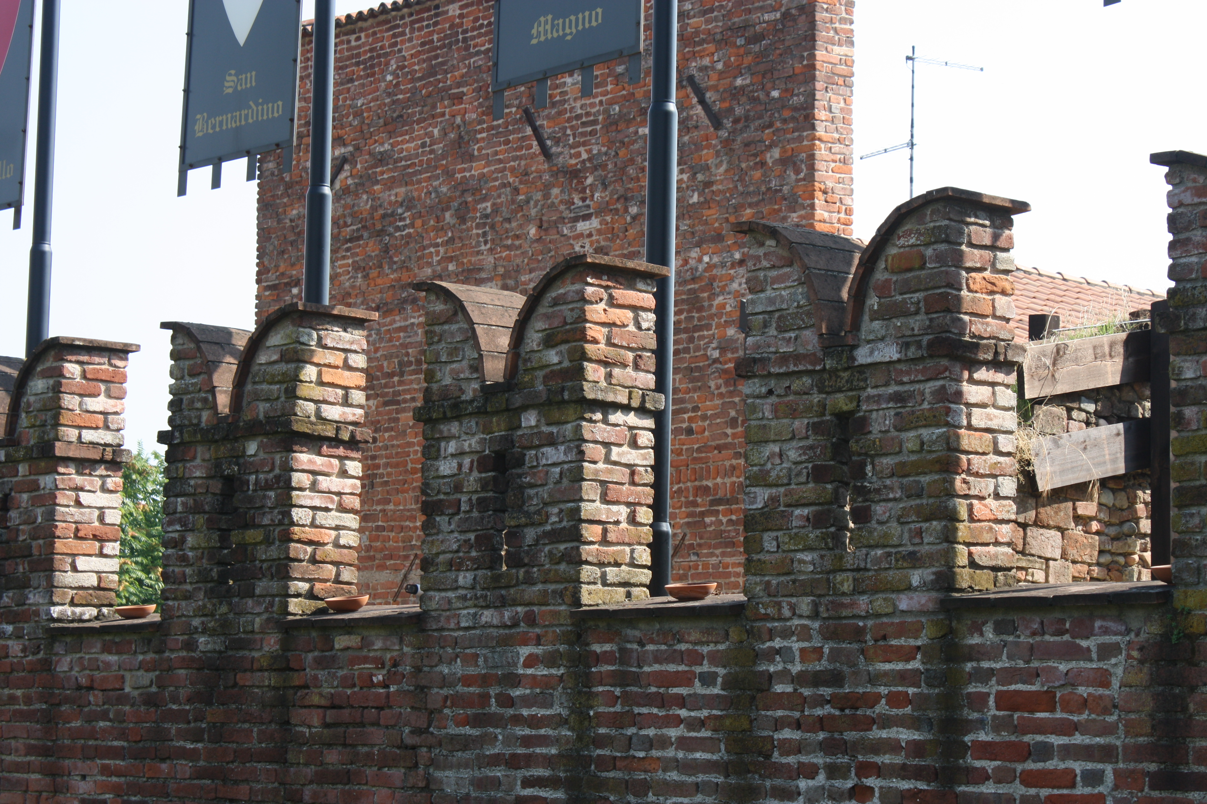 Castello di San Giorgio This is a photo of a monument which is part of cultural heritage of Italy.